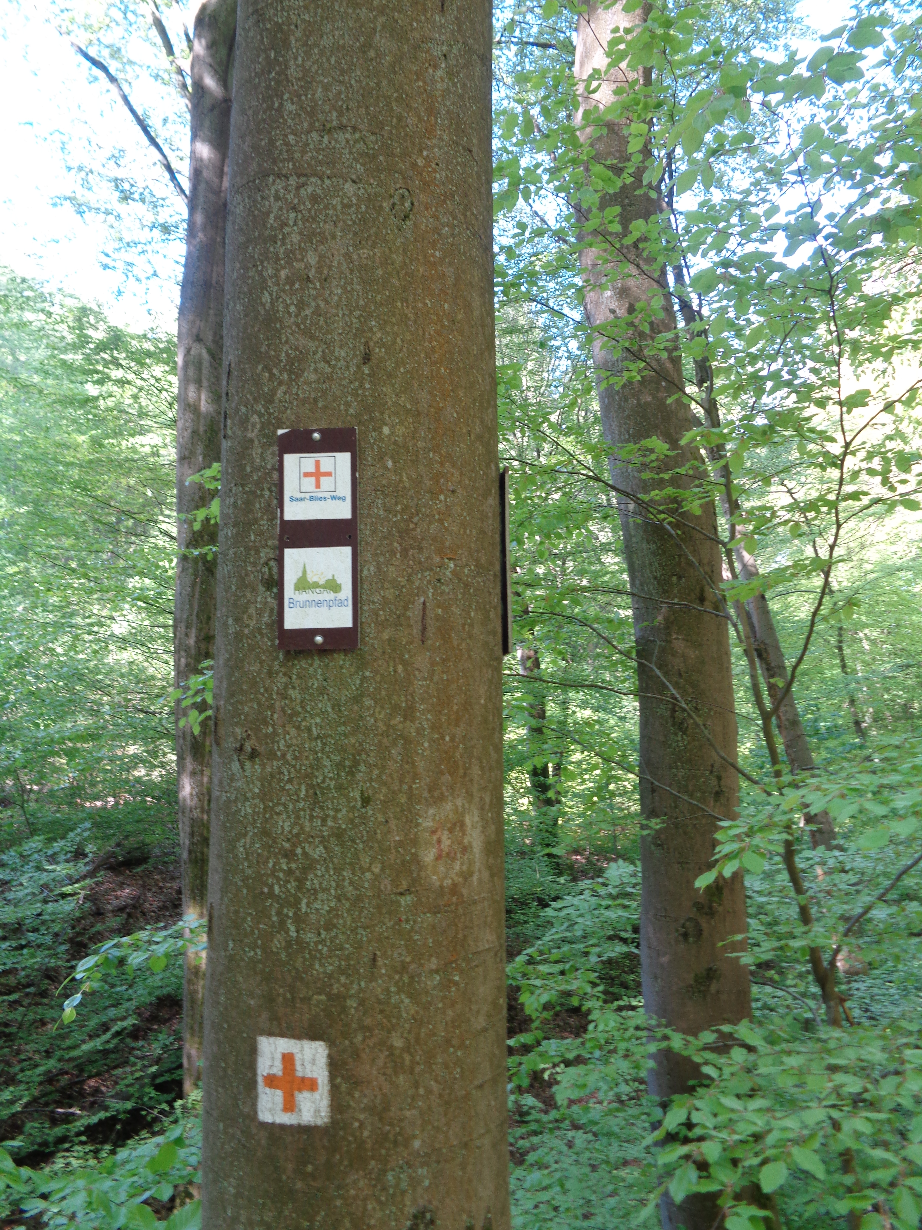 Doppelbeschilderung kurz vor der Hanauer Mühle